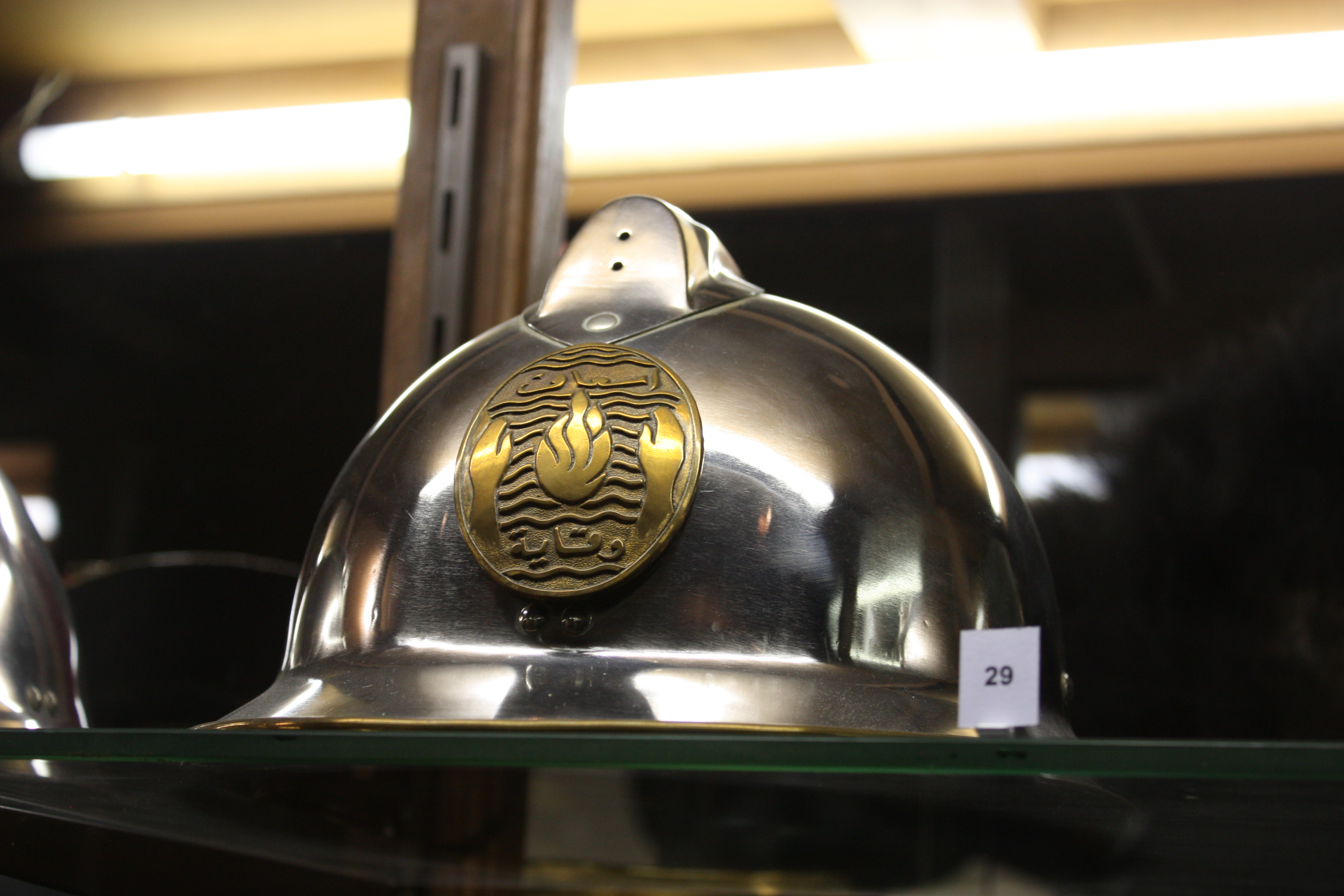 collection du Musée départemental des sapeurs pompiers d'Osny